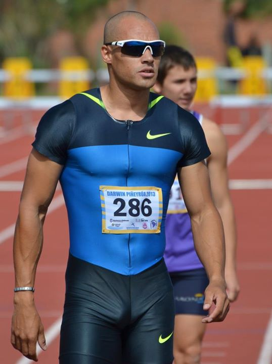 Andres SIlva en el Torneo Darwin Piñeyrua, San Carlos